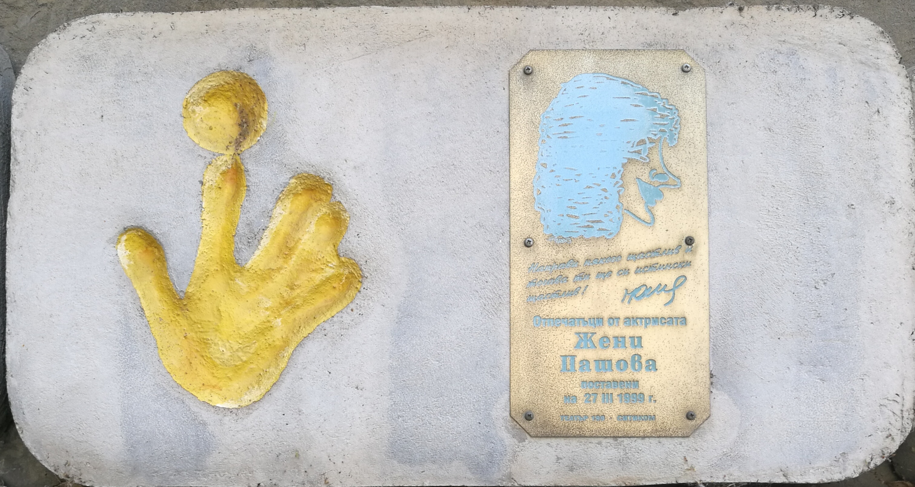 Стената на славата пред Театър 199 - пано с отпечатъци, послание и шарж на Жени Пашова.